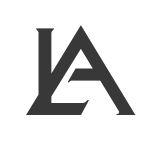 Kjo steme eshte prone intelektuale e Lady Albania